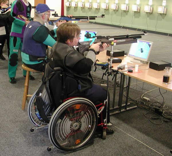 Sportschießen für Körperbehinderte - im Sitzen mit Hocker, im Rollstuhl